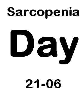 יום הסרקופניה העולמי